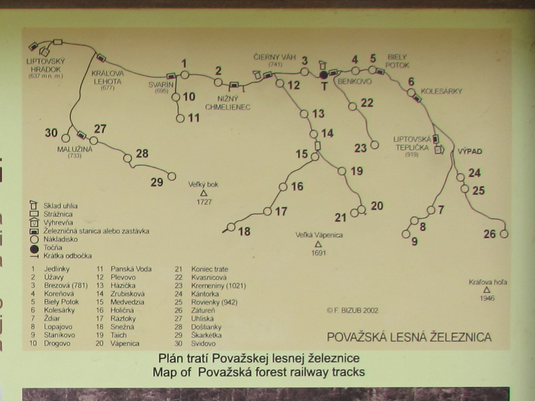 Teilausschnitt einer aufgestellten Informationstafel: Plan der Považská lesná železnica